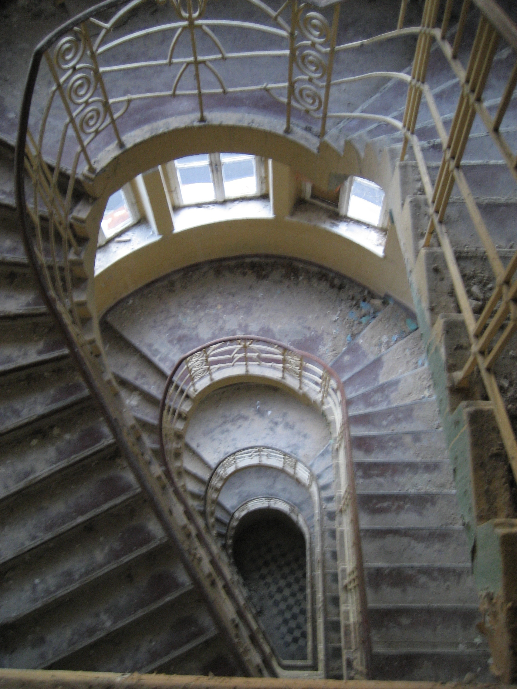 Treppenhaus Lychner Heilanstalten (Heilanstalten Hohenlychen)